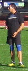 Frantz Kruger Paavo Nurmen kisoissa, Paavo Nurmen stadionilla, Turussa, 24. kesäkuuta 2009